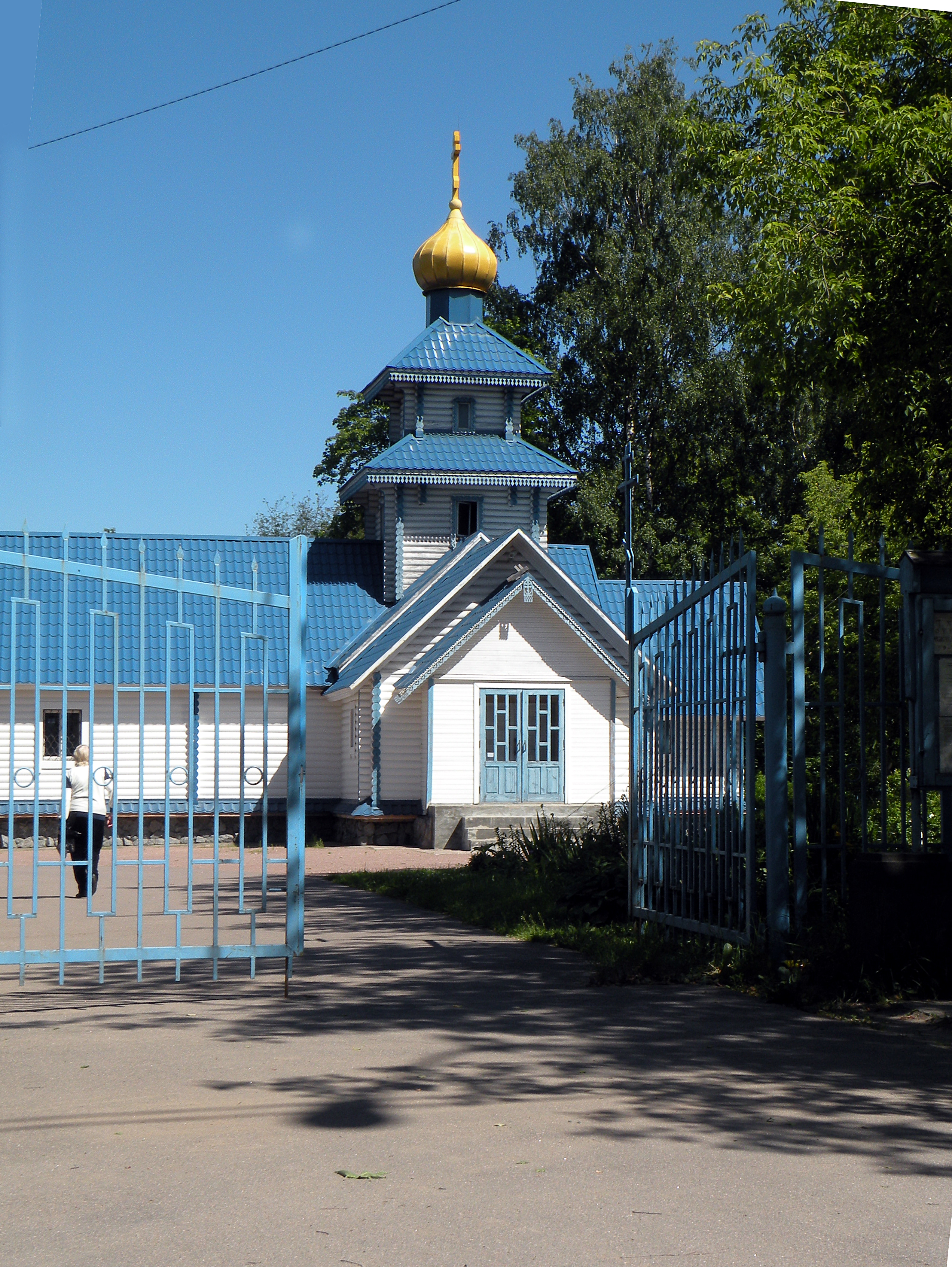 Православная церковь в пос.Рощино (Райвола)